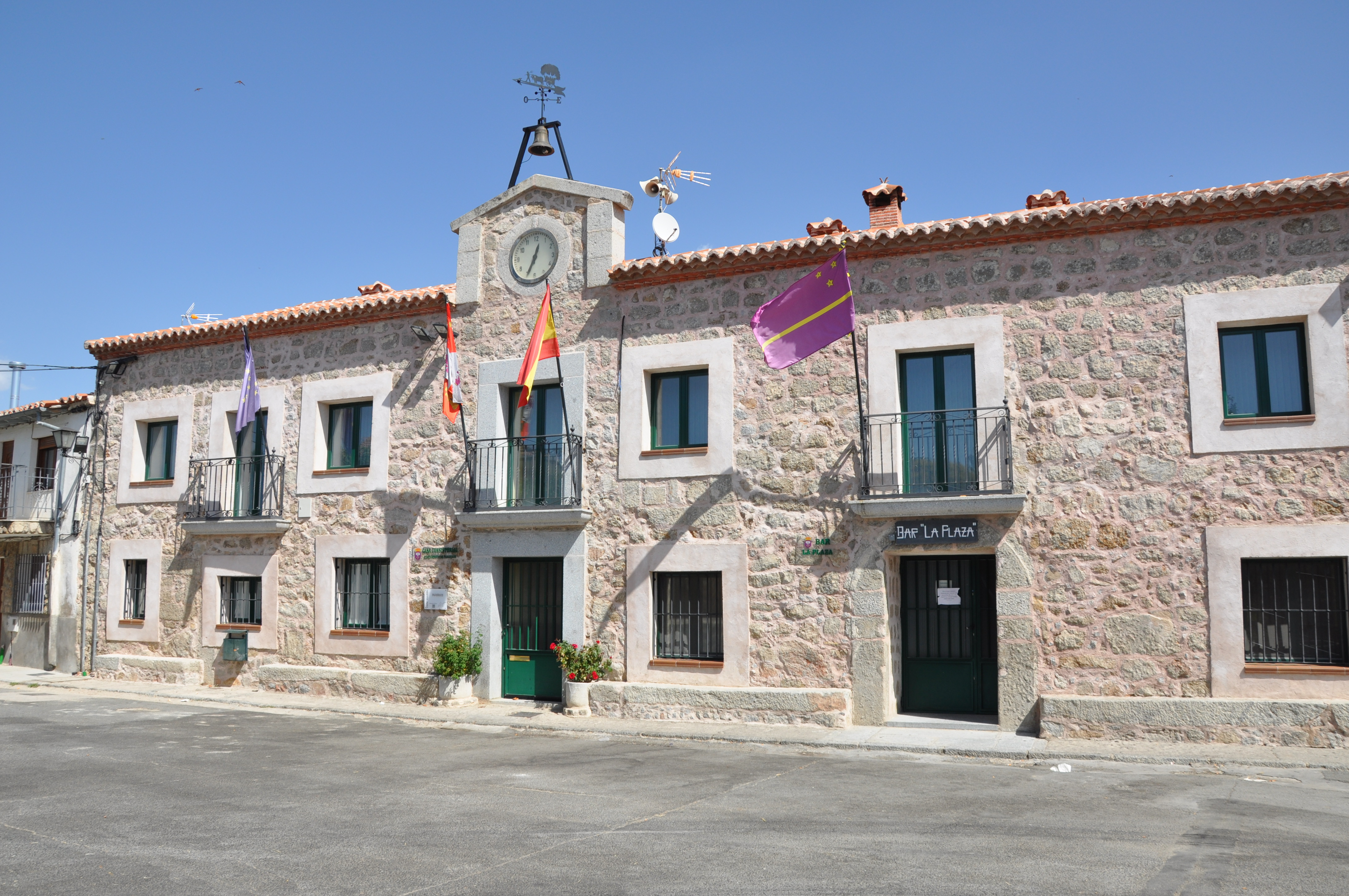 Ayuntamiento de Padiernos, Ávila, España.